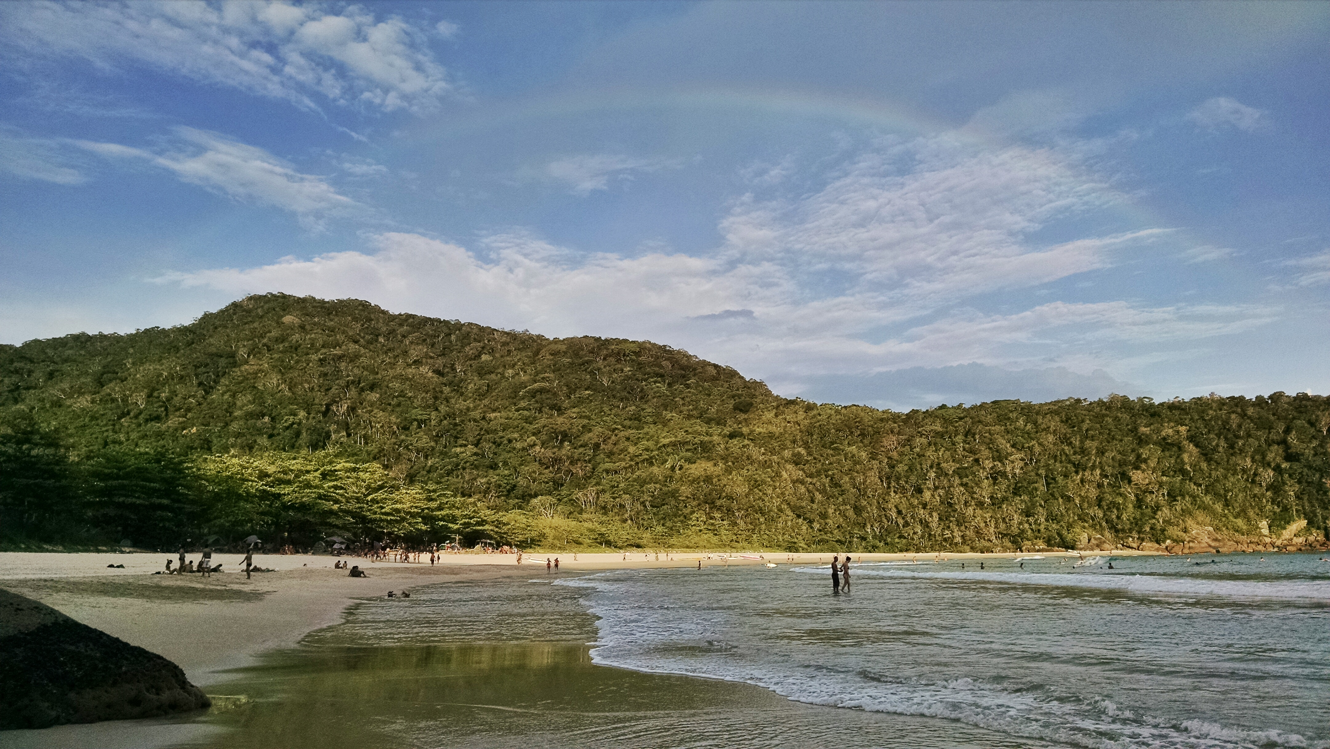 Arco-íris na praia de Martim de Sá